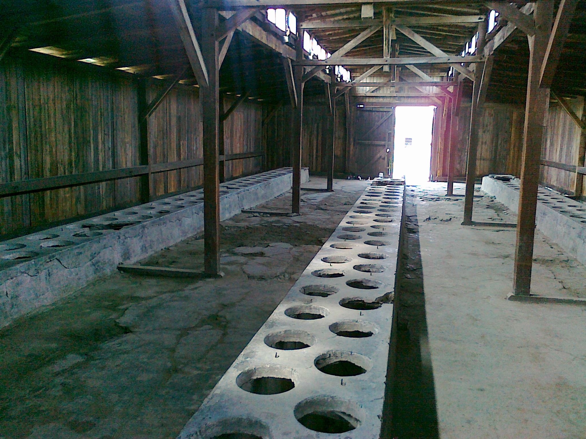 Birkenau múzeum